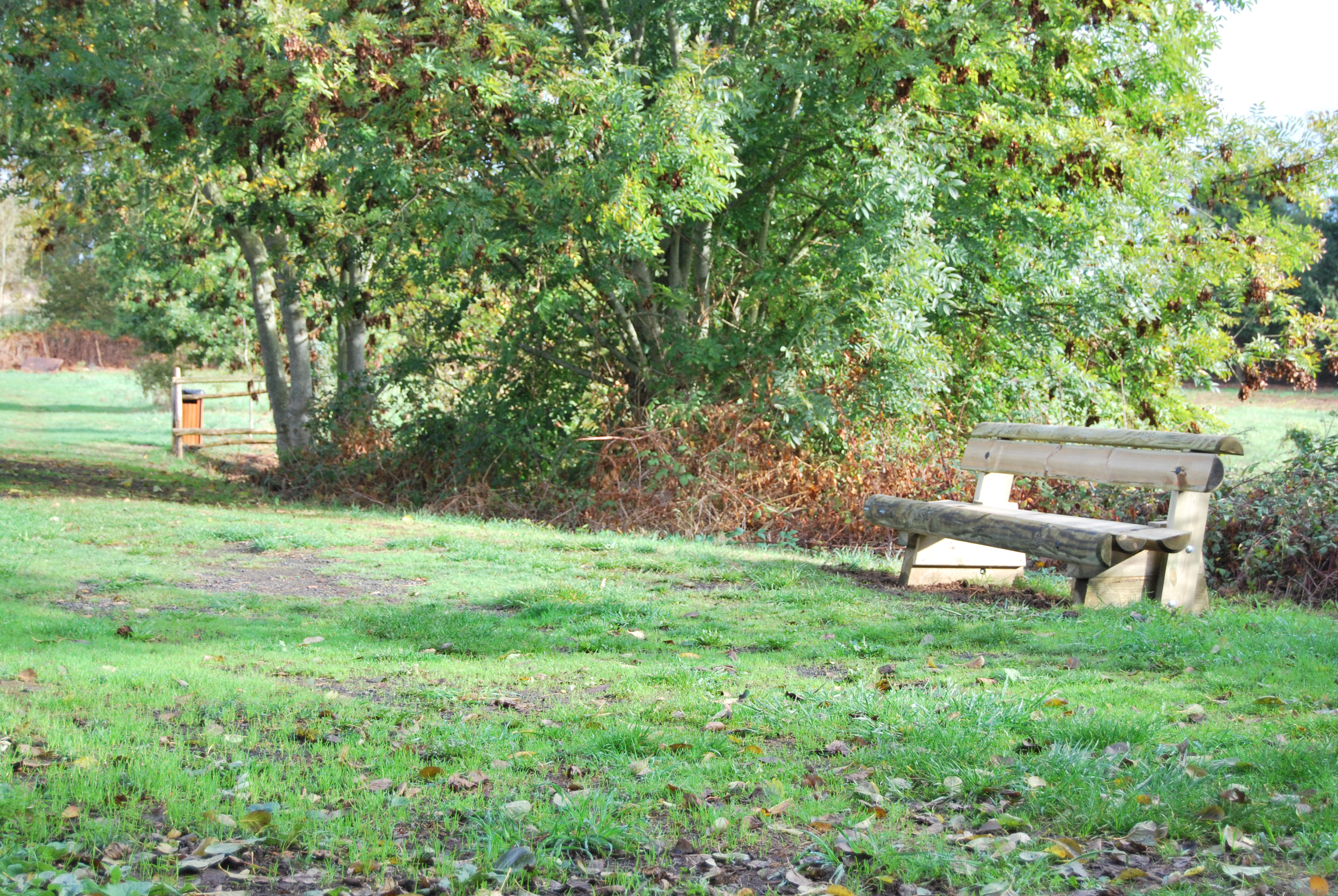 Bancs sur les bords de l'étang de La Rivière de Saint-Georges-du-Bois dans le département français de la Sarthe, en octobre 2009.